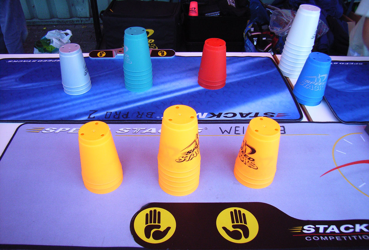 Eigenes Foto, Präsentation Süßerfest Butzbach-Ostheim, Aufbau zum 3-6-3 oder cycle. Der cycle ist die Königsdisziplin des speed stacking, also die schwierigste. Im cycle muss man 3 Figuren beherrschen: 3-6-3, zweimal einen 6er-Turm und den 12er-Turm.